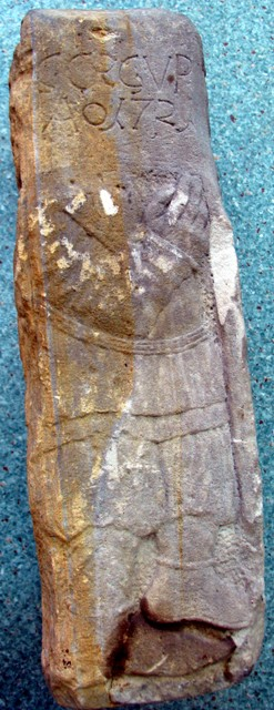 Słup graniczny z XVI/XVIII wieku spod Szprotawy, przechowywany w Muzeum Ziemi Szprotawskiej.